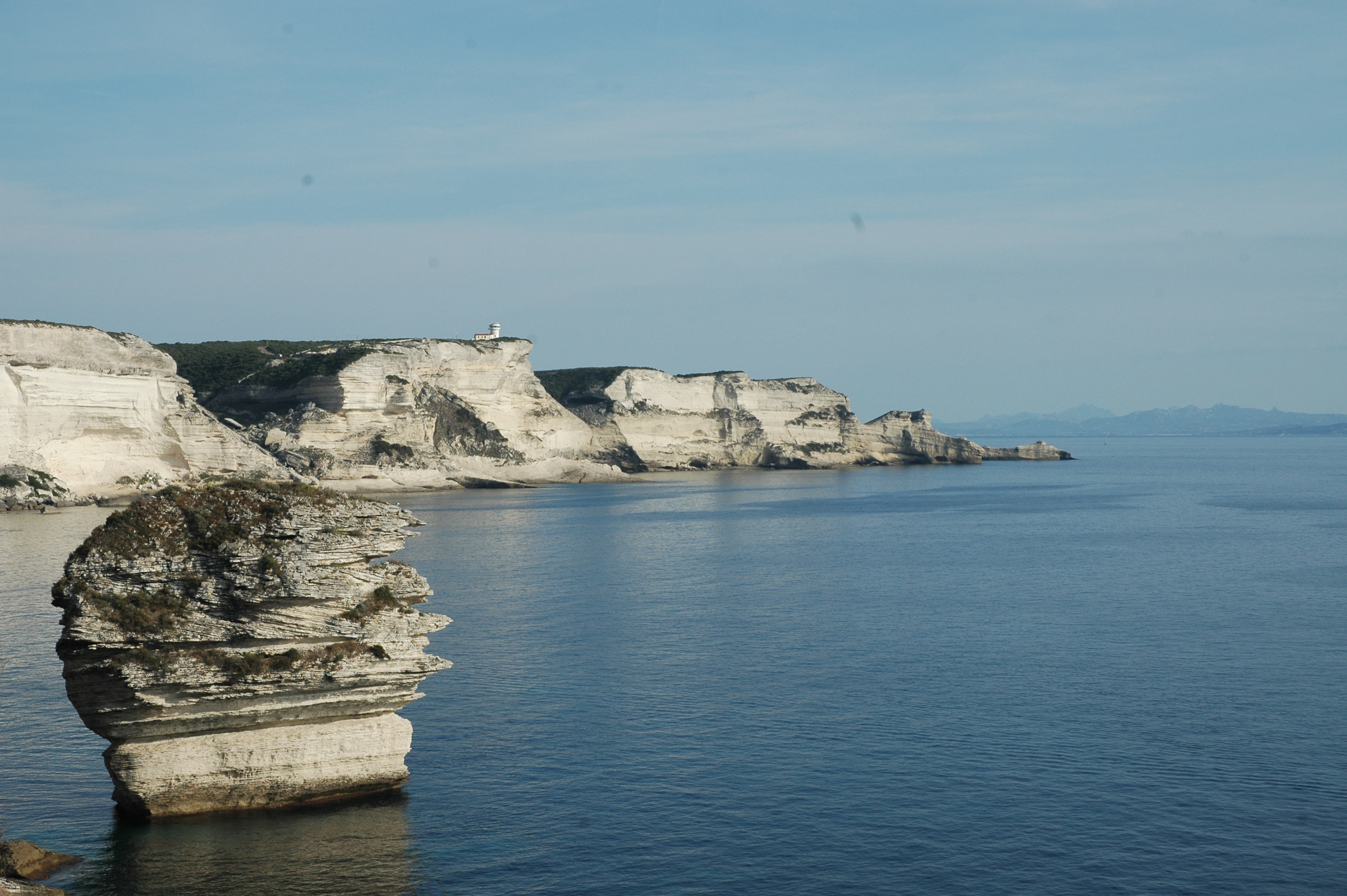 rezerwat natury Cieśniny św. Bonifacego, Korsyka